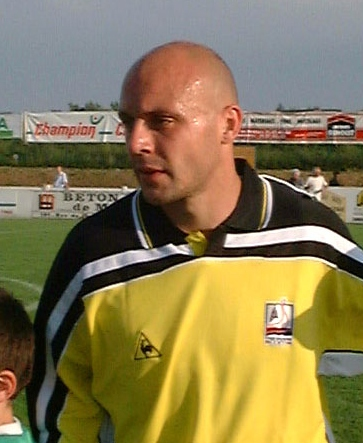 Frédéric Viseux à la fin du match amical Caen - Guingamp en juillet 2000 à Courseulles sur Mer.